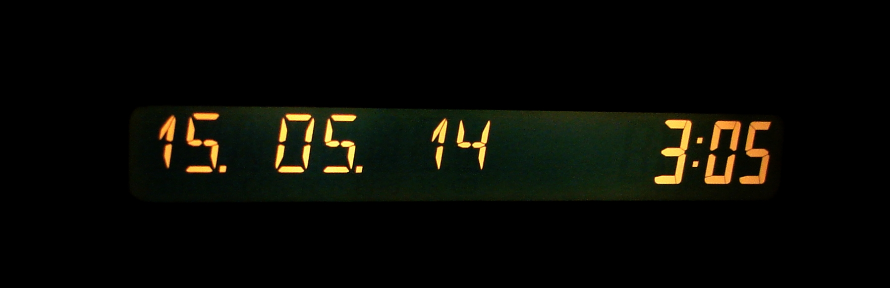 Wyświetlacz DID stosowany przez Adam Opel AG